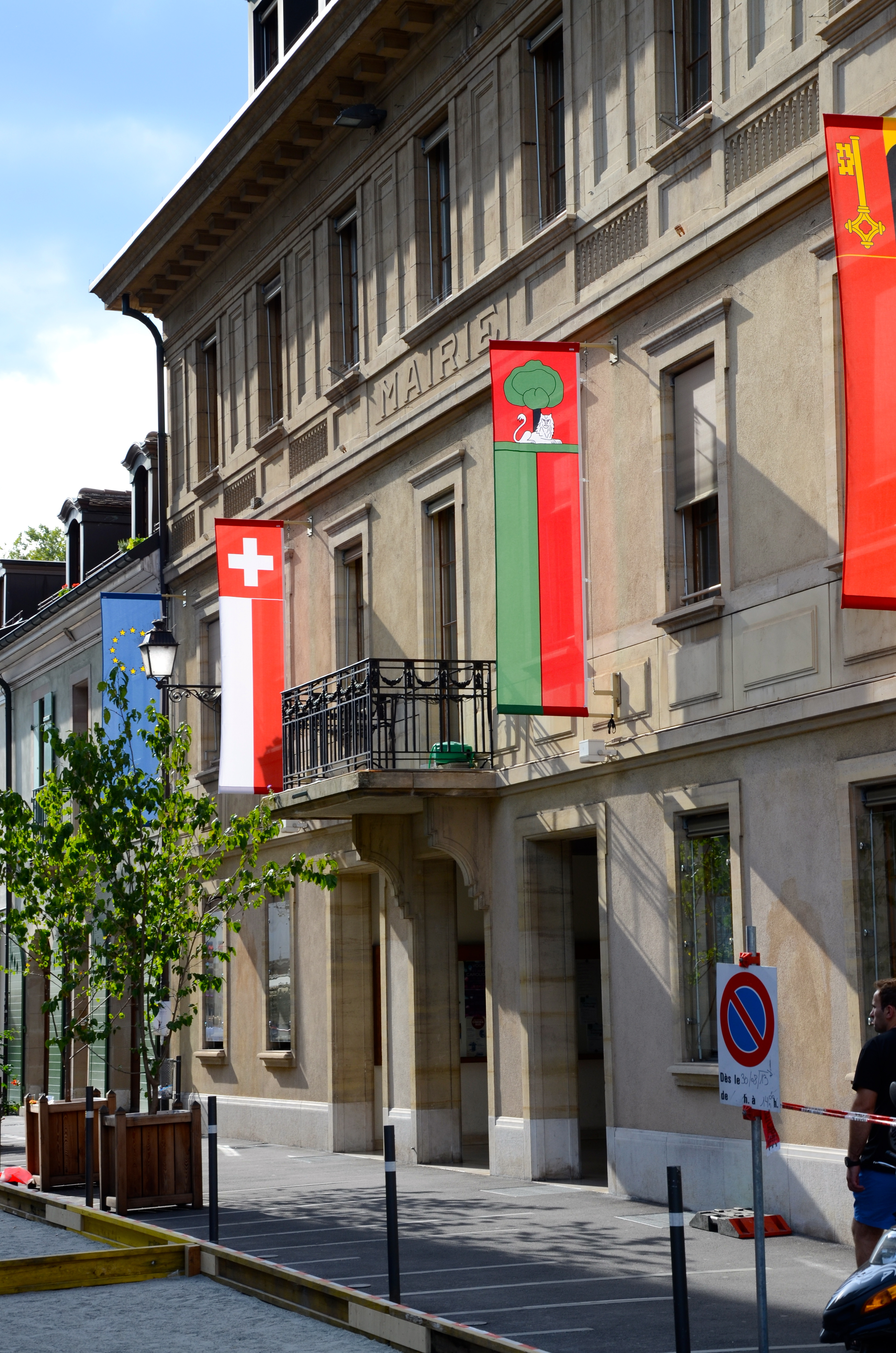 Archive municipale Mairie de Carouge Place du Marché 14. Jusqu'en 2016.